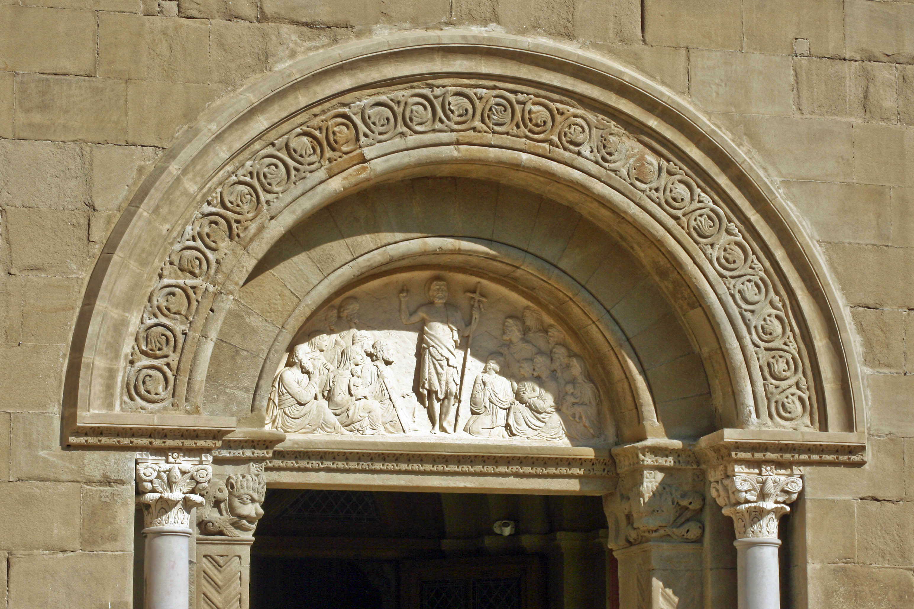 Église Saint-Jean-Baptiste, Valence (Drôme), France : porche.